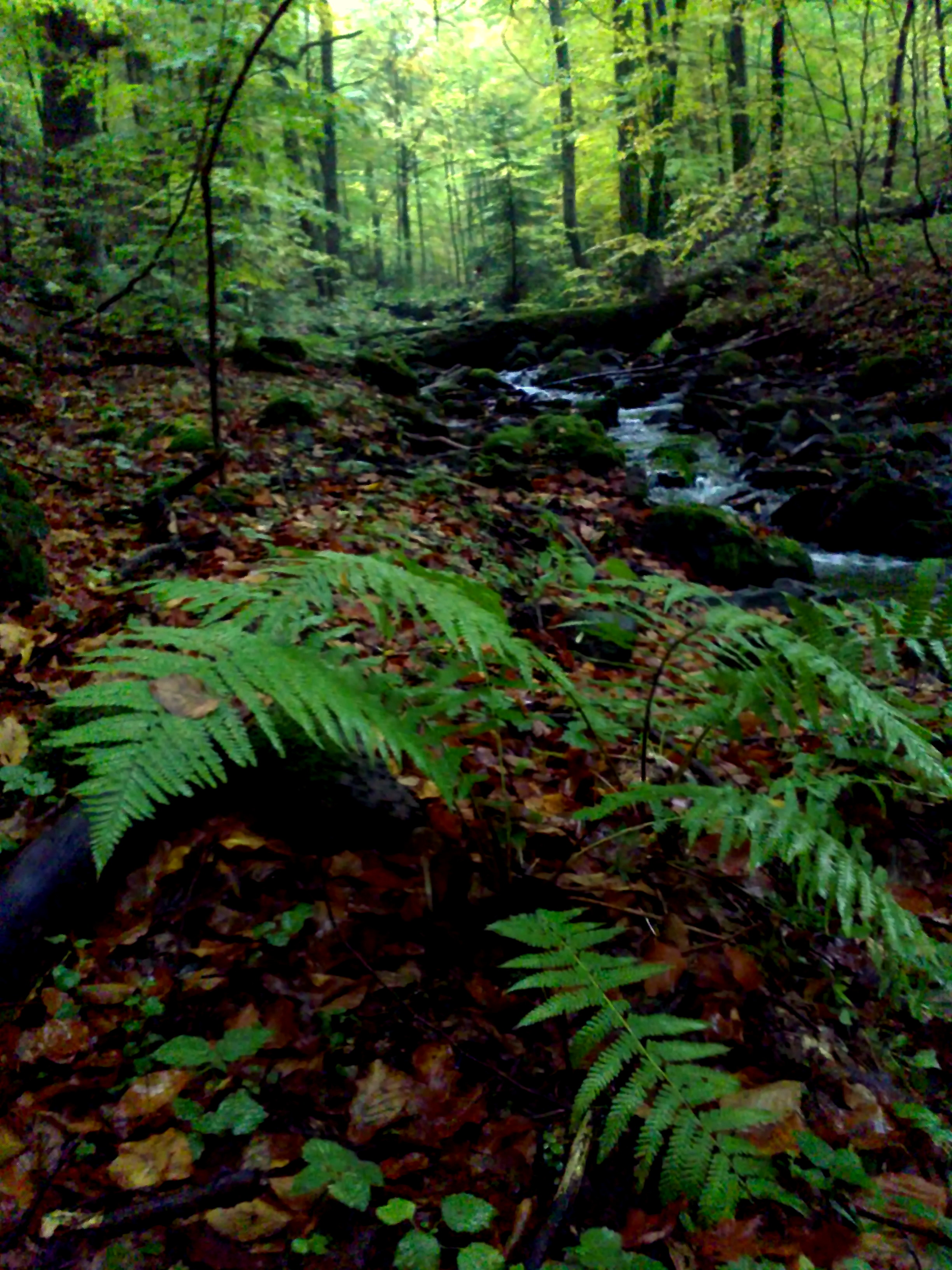 Vegetácia v Badínskom pralese - papraď.